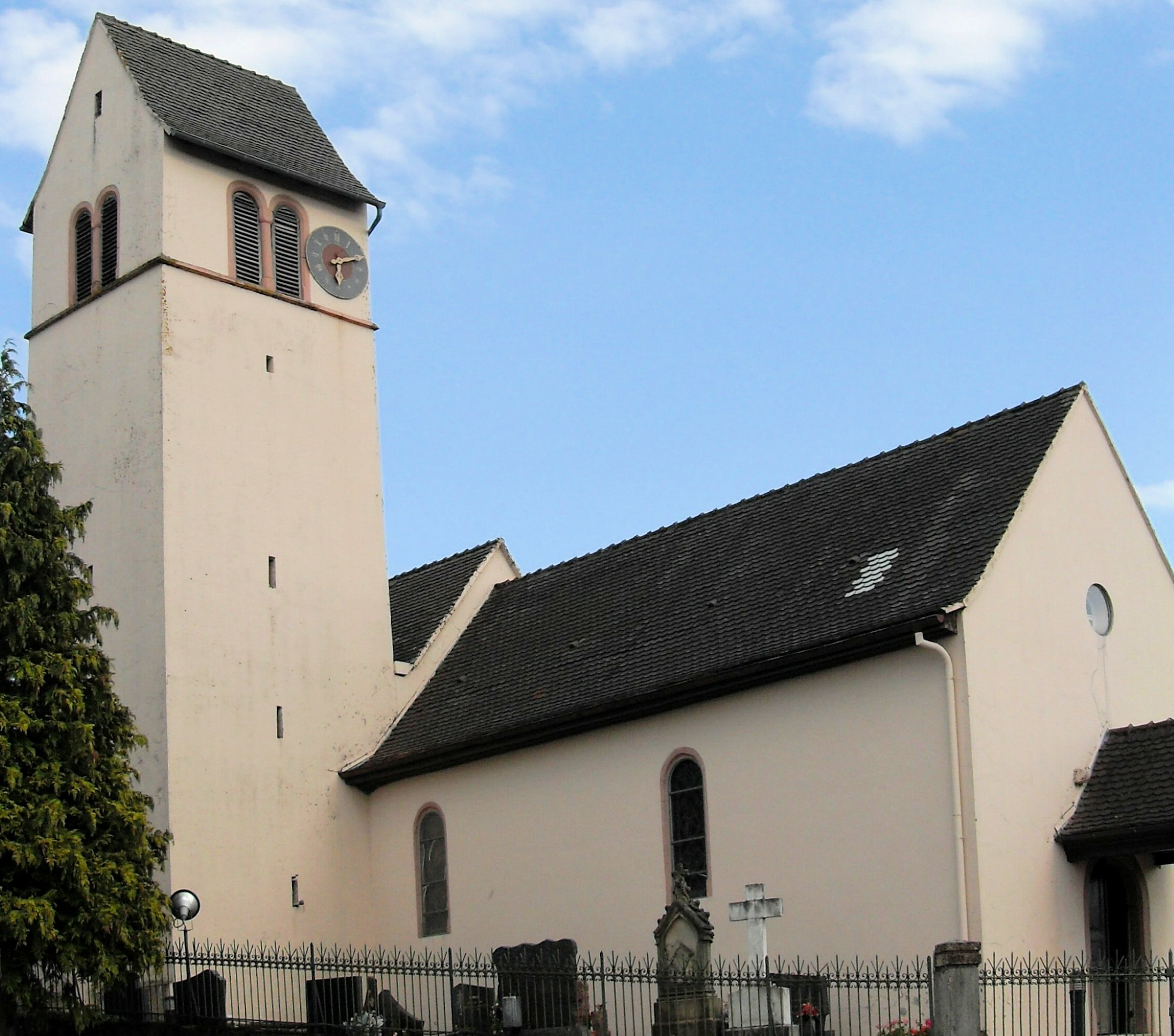 L'église Saint-Maurice à Levoncourt